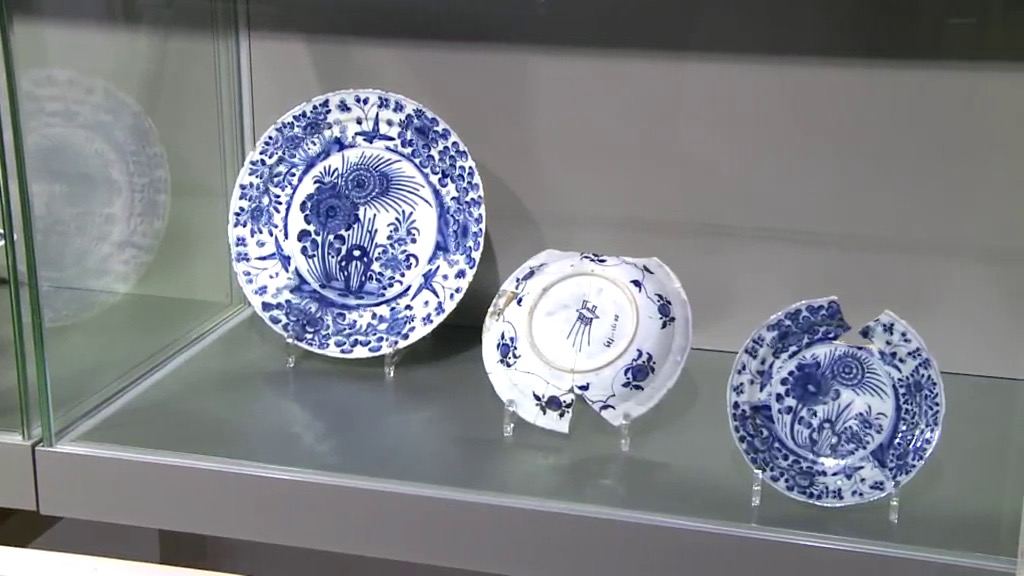 Museum Prinsenhof Delft